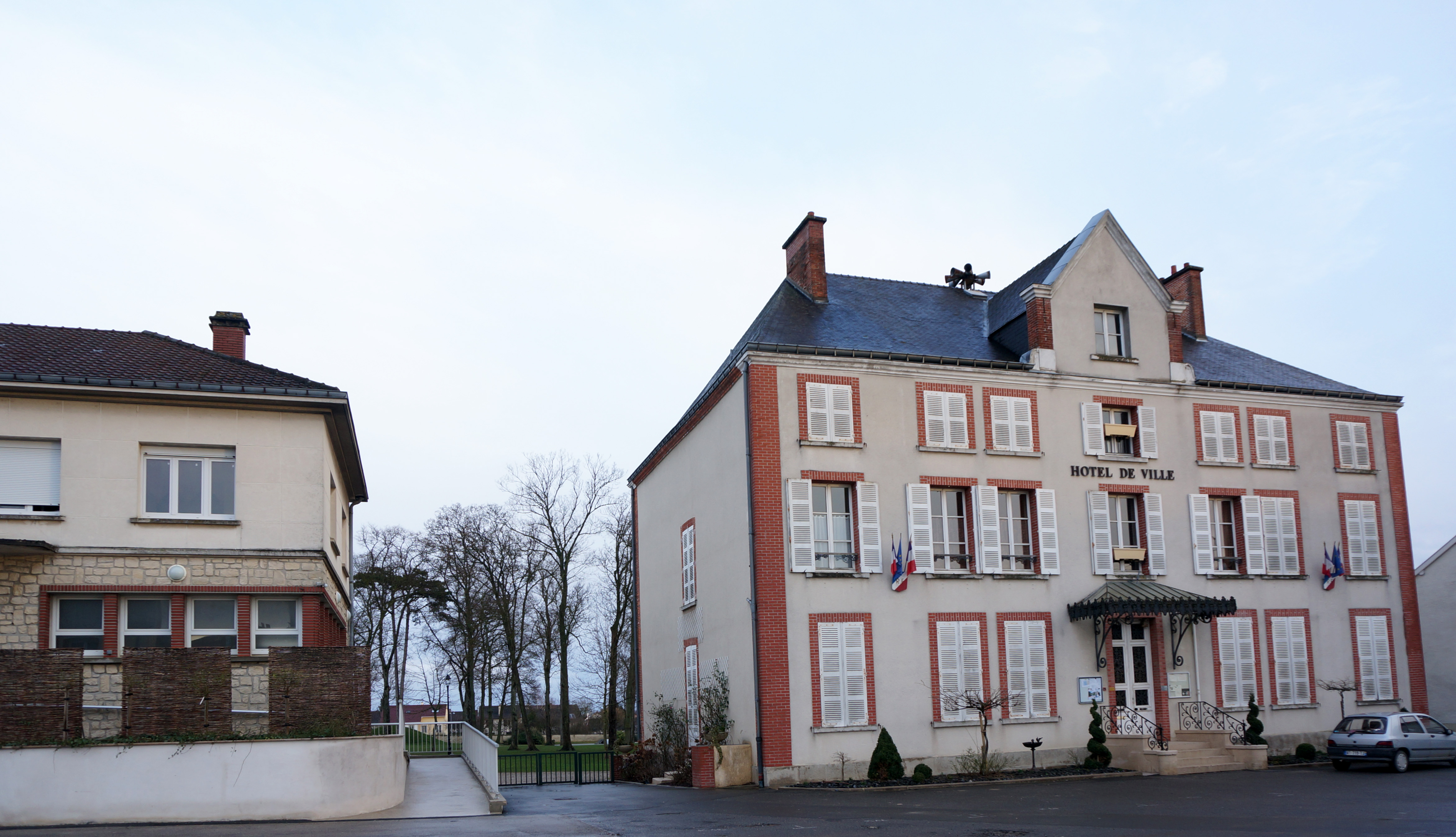 Vue de la Mairie.